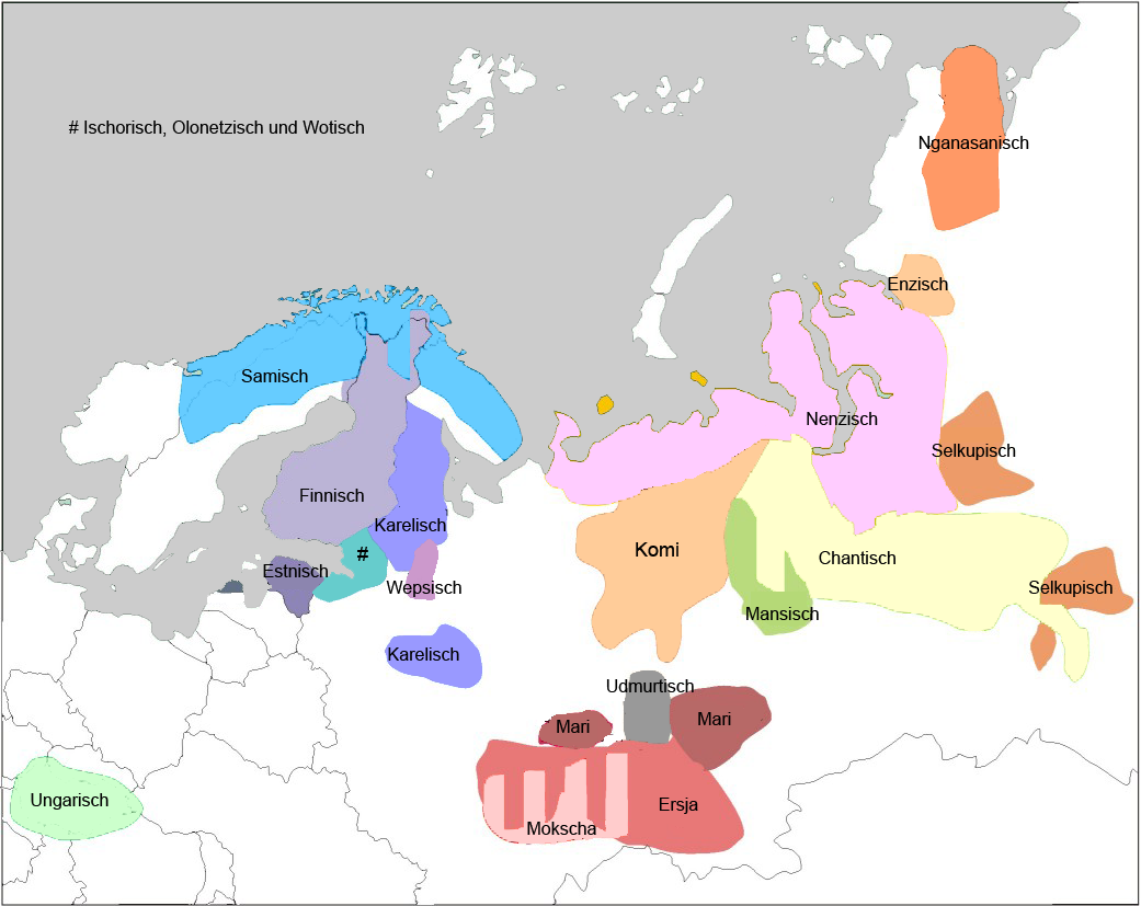 Verbreitung finno-ugrischer Völker Deutsche Übersetzung der Datei File:Fenno-Ugrian_people.png